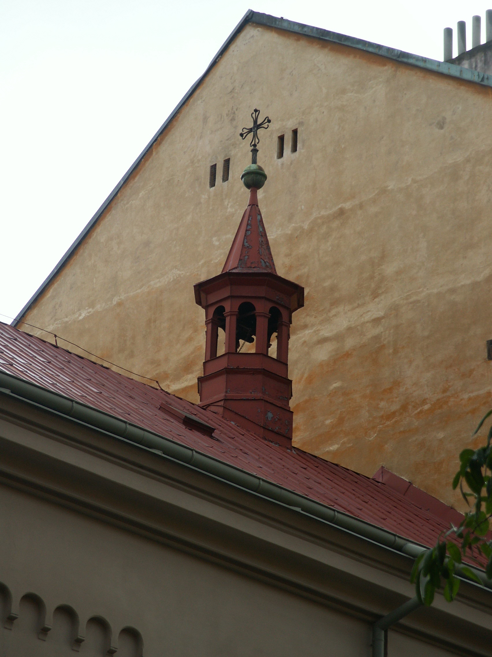 Kaple svatého Karla Boromejského, Praha 8-Karlín, Vítkova, v řadě mezi č. o. 10 a 12 - věžička